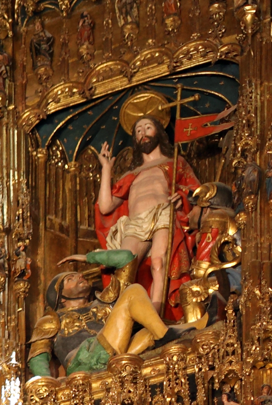 Resurrecciónd e Jesús, detalle del retablo mayor de la Catedral de Toledo (España)